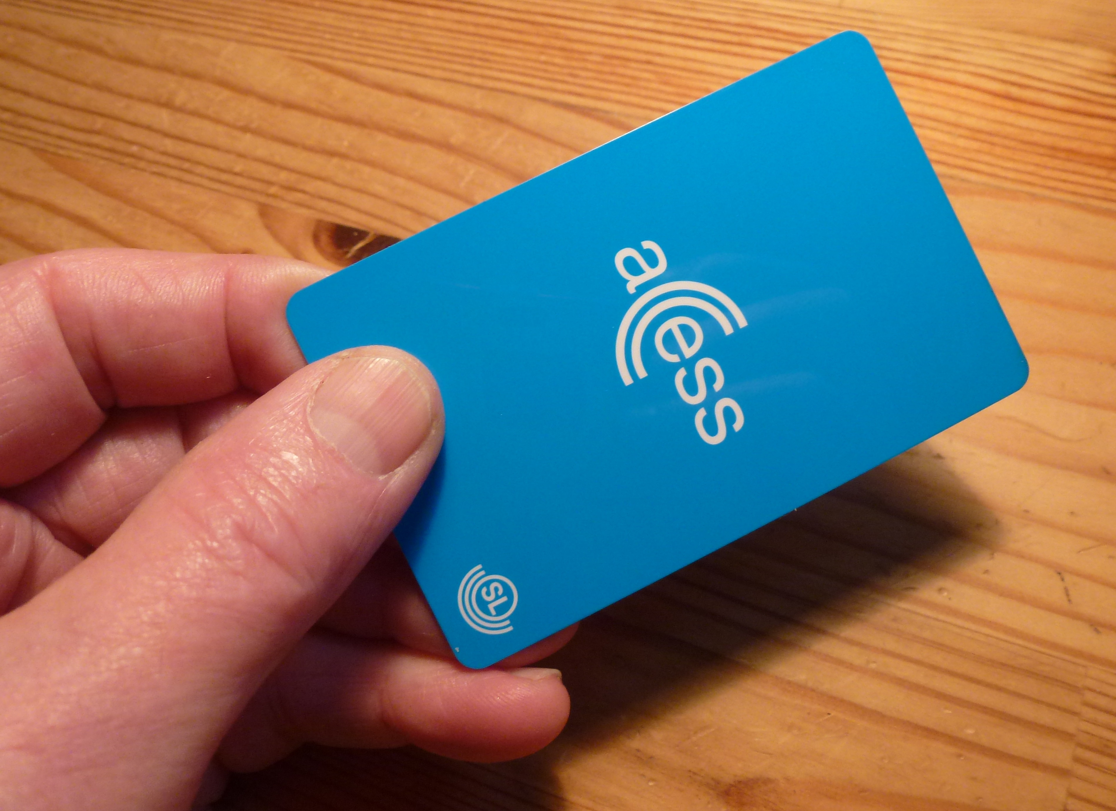 SL Access kort